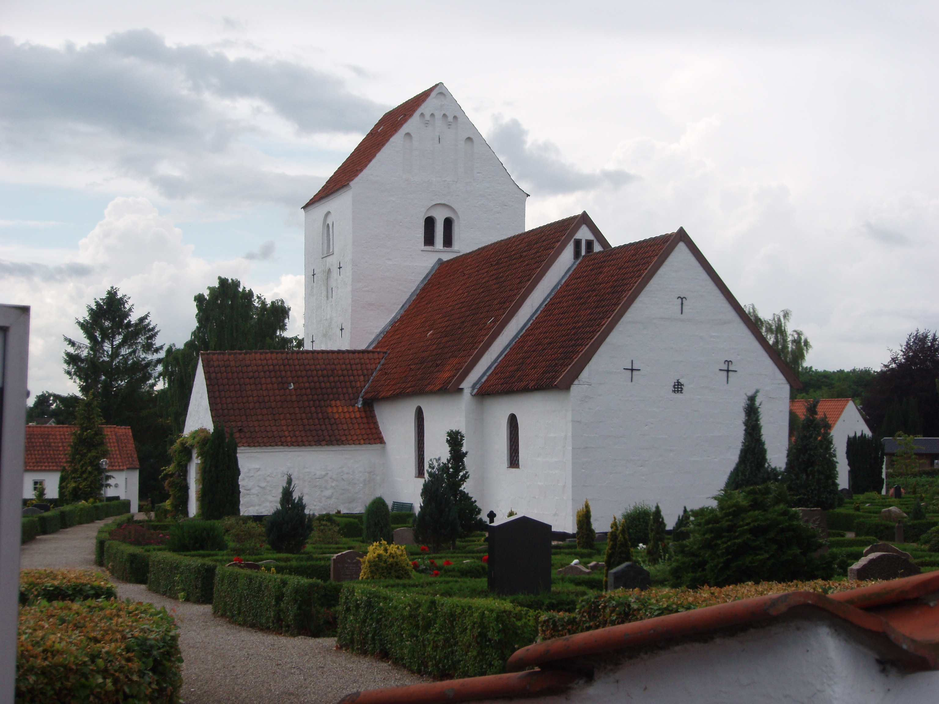 Søvind kirke